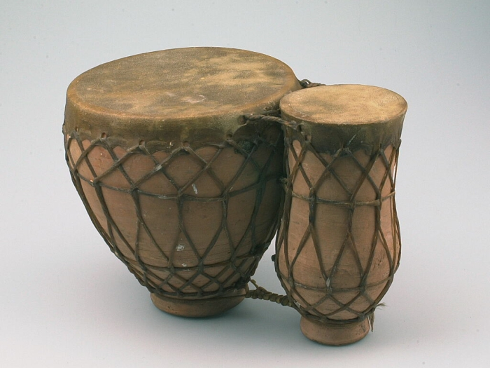 De vellen van deze dubbele keteltrom zijn op de tromlichamen van aardewerk bevestigd door middel van leren spankoorden in netvorm, die aan het vel geregen zijn. De trommen zijn aan elkaar bevestigd met leren koorden.